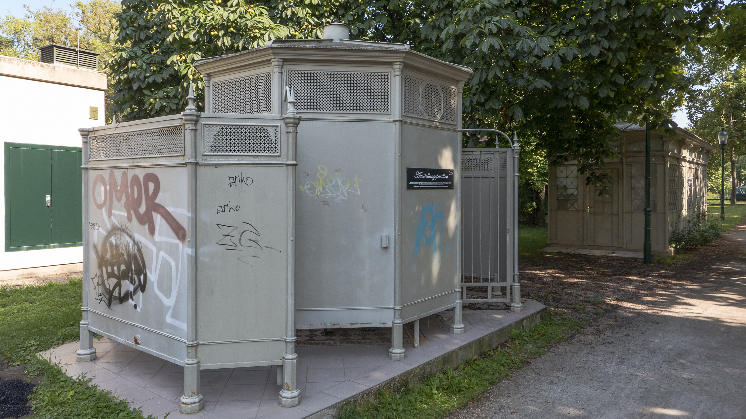 Jazzpark Essling in Wien 22